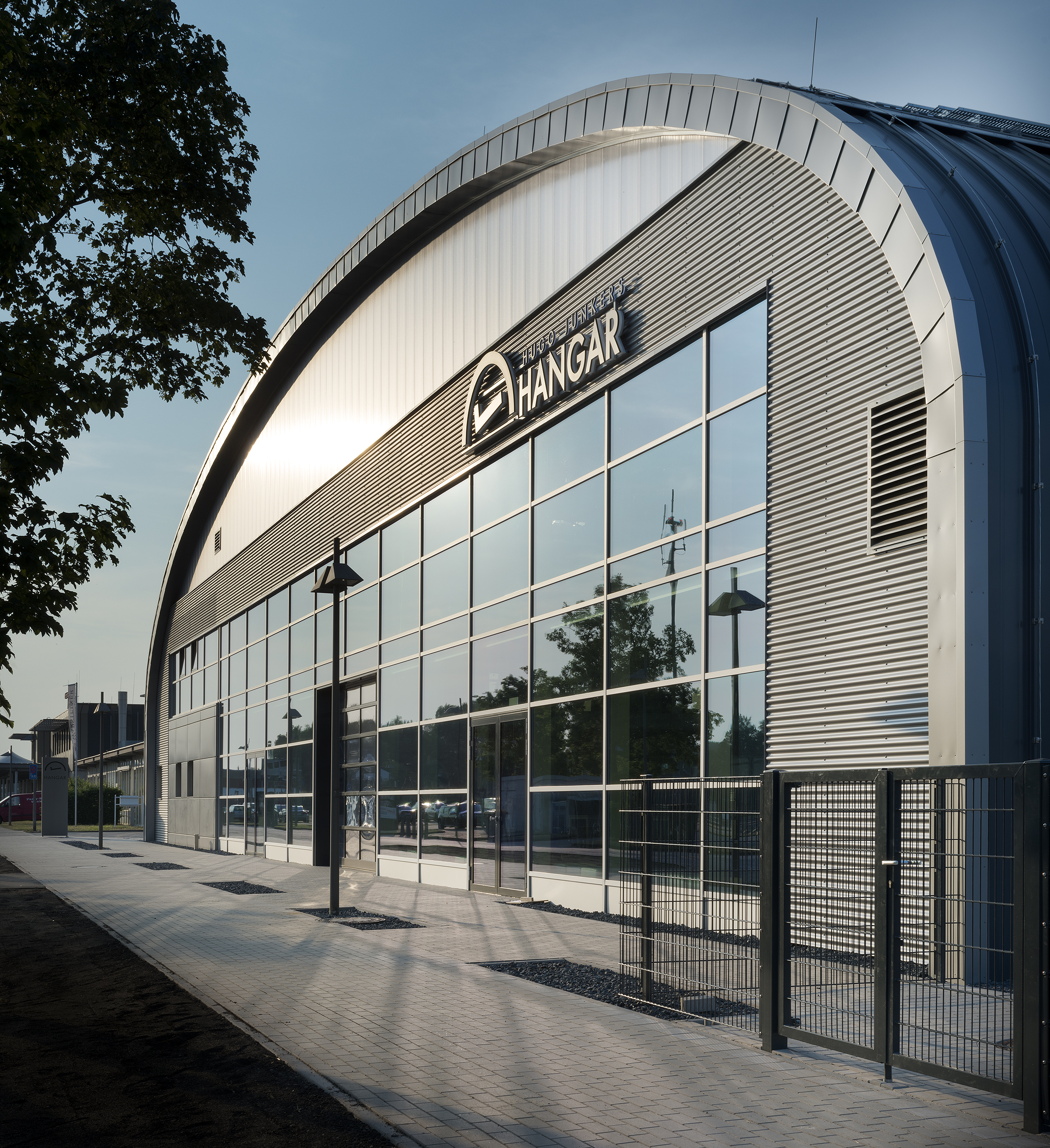 Event-Hangar in Mönchengladbach